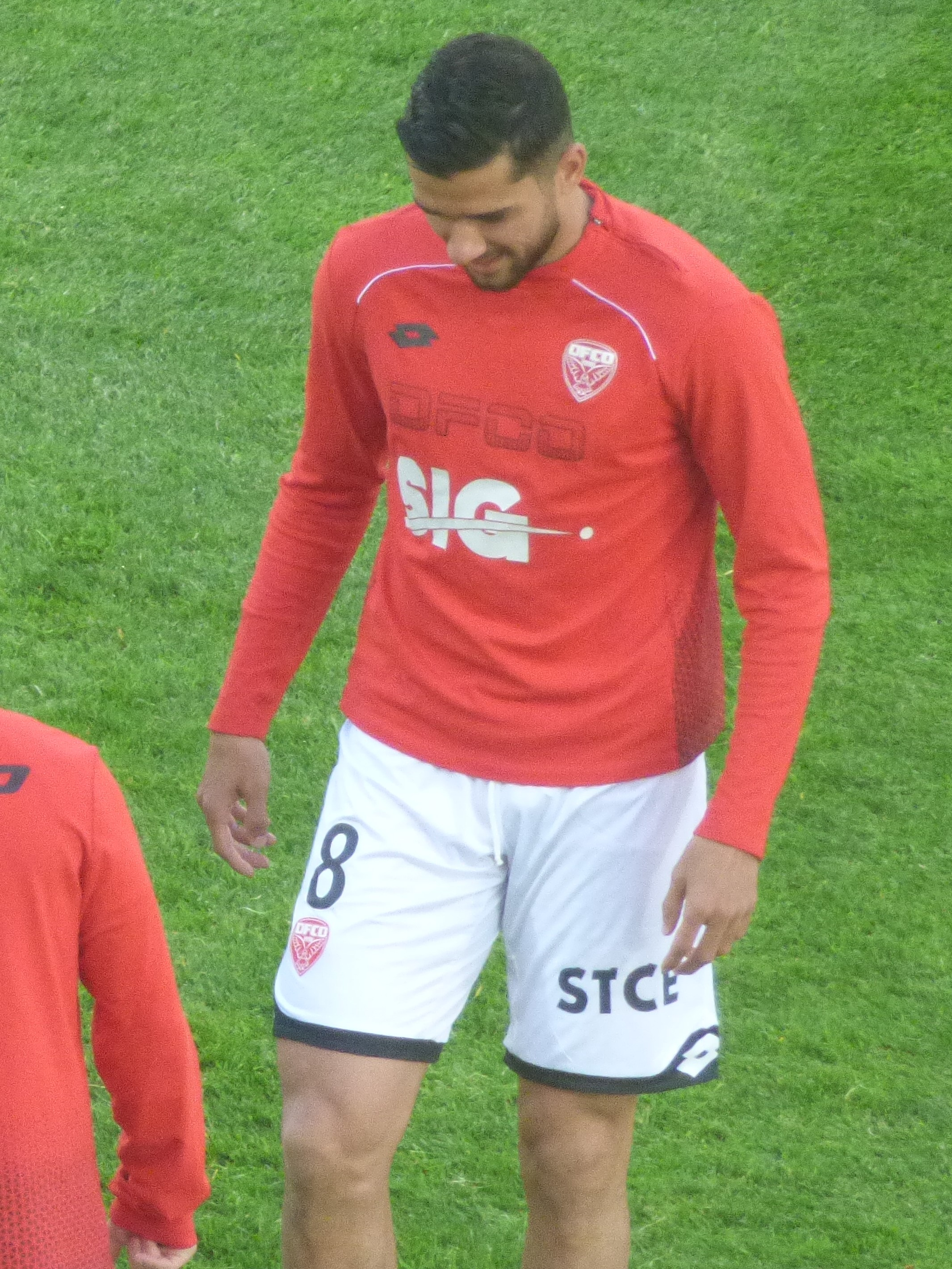 Mehdi Abeid avant le match RC Lens / Dijon FCO, match aller des barrages pour la montée en Ligue 1 2018-2019, le 30 juin 2019, au Stade Bollaert-Delelis.